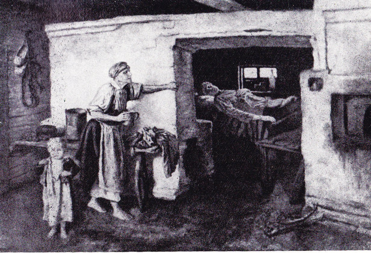 Хворий (ч/б зображення)